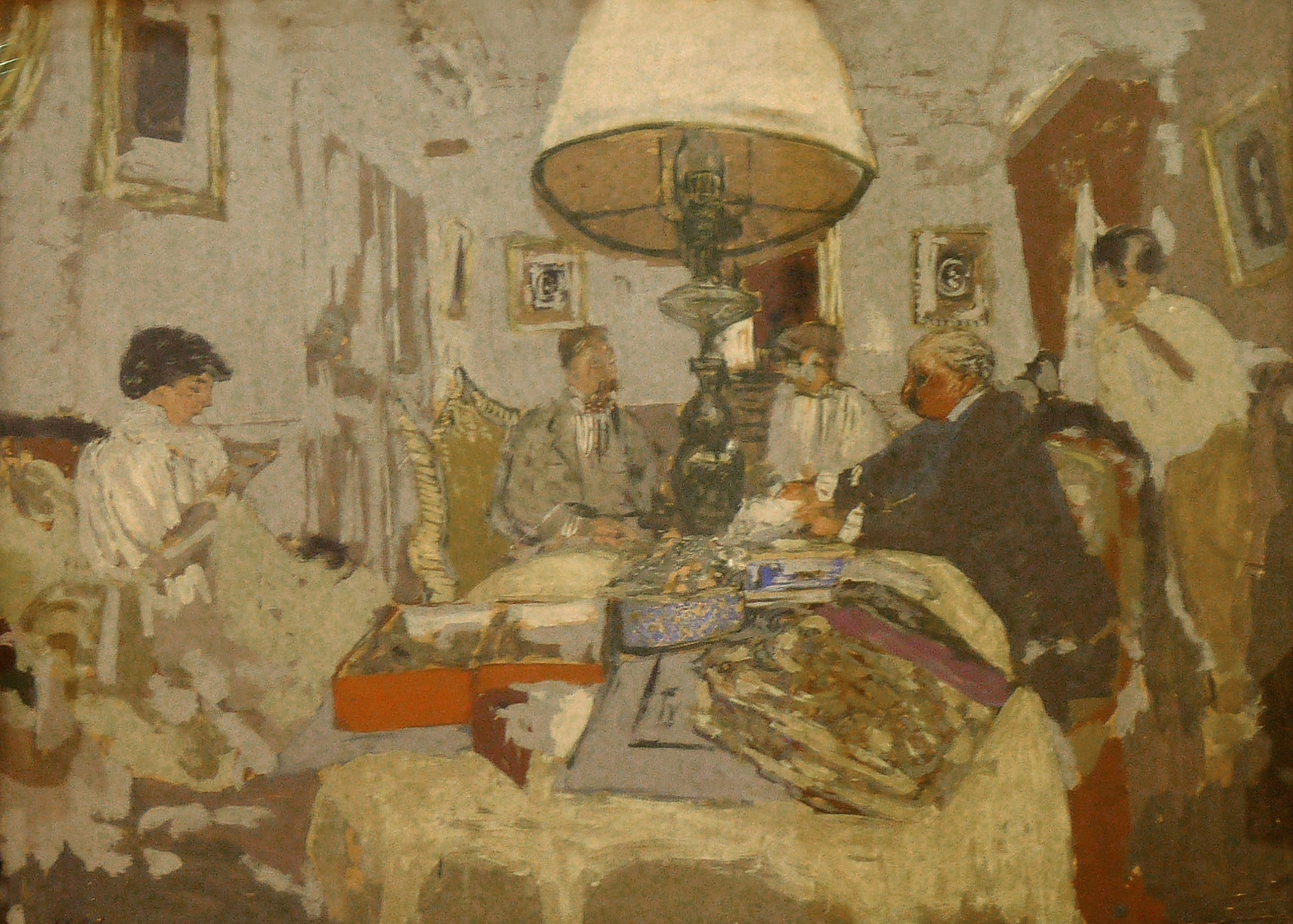 Le amis autour de la table, Saint-Jacuttitle QS:P1476,fr:"Le amis autour de la table, Saint-Jacut" label QS:Lfr,"Le amis autour de la table, Saint-Jacut"